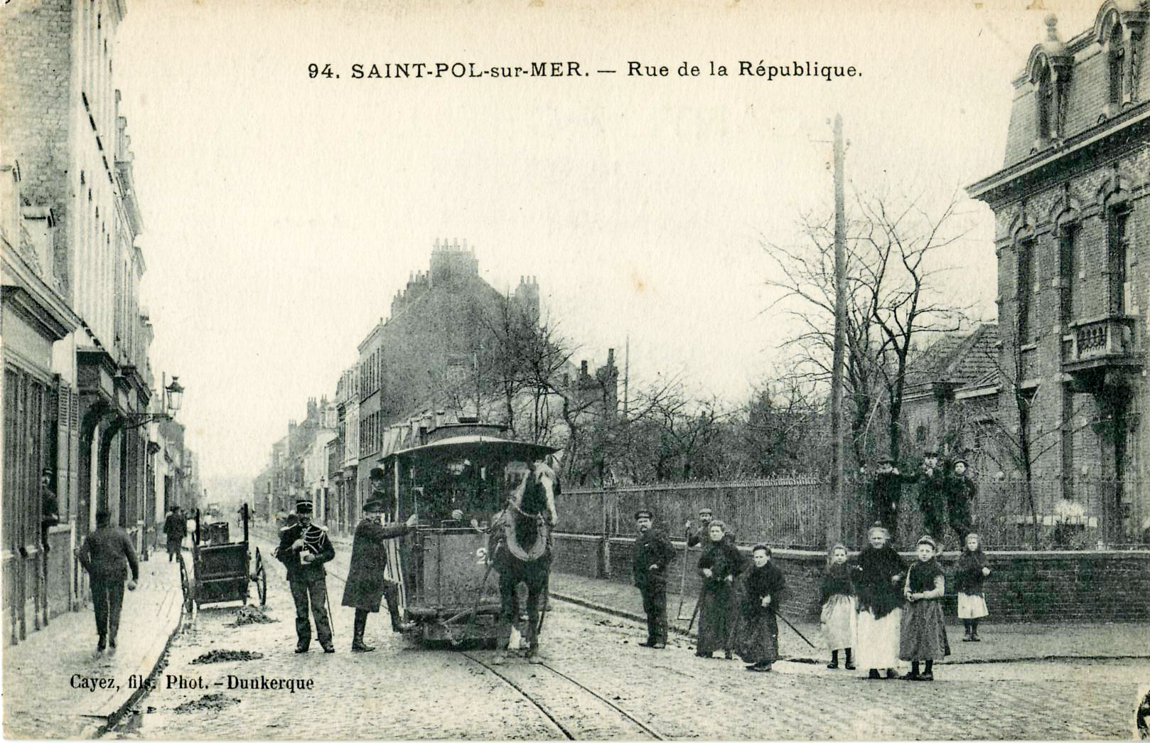 Carte postale ancienne éditée par Cayez fils à Dunkerque, n°94 :SAINT-POL-SUR-MER - Rue de la République